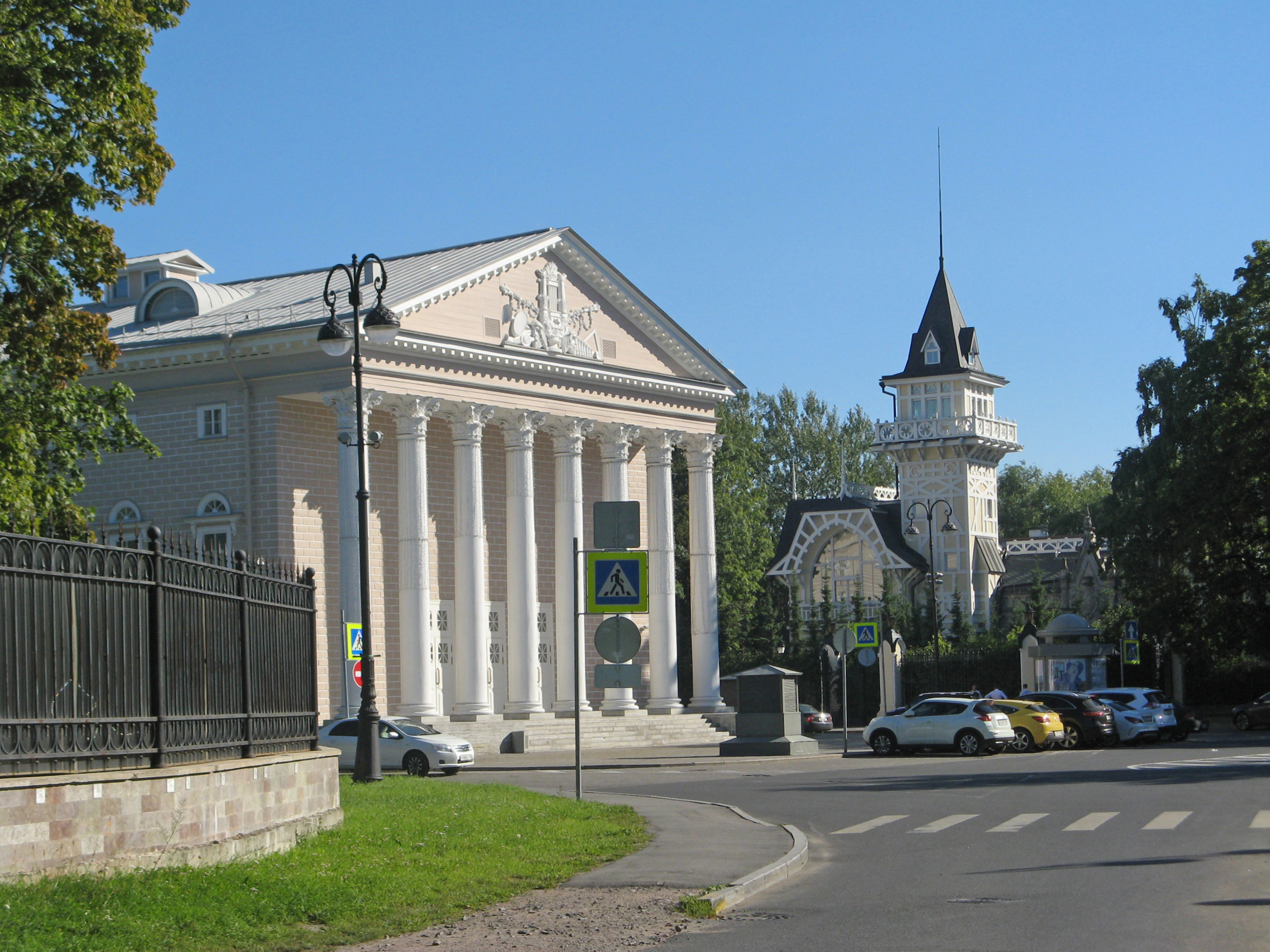 Театр Каменноостровский: р. Крестовки набережная, 10, Петроградский район, Санкт-Петербург